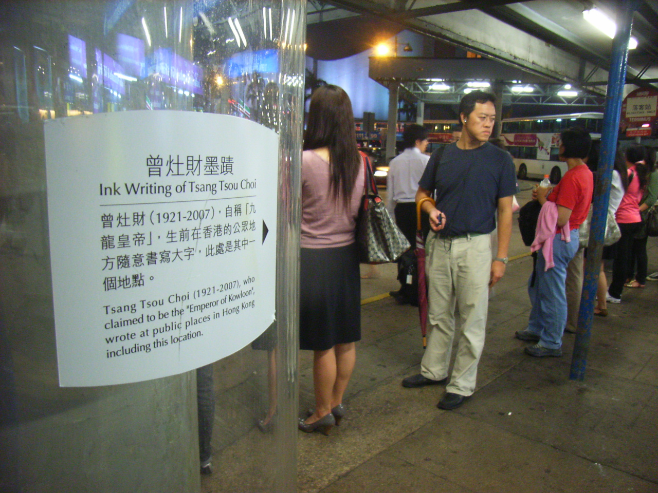 尖沙咀曾灶財